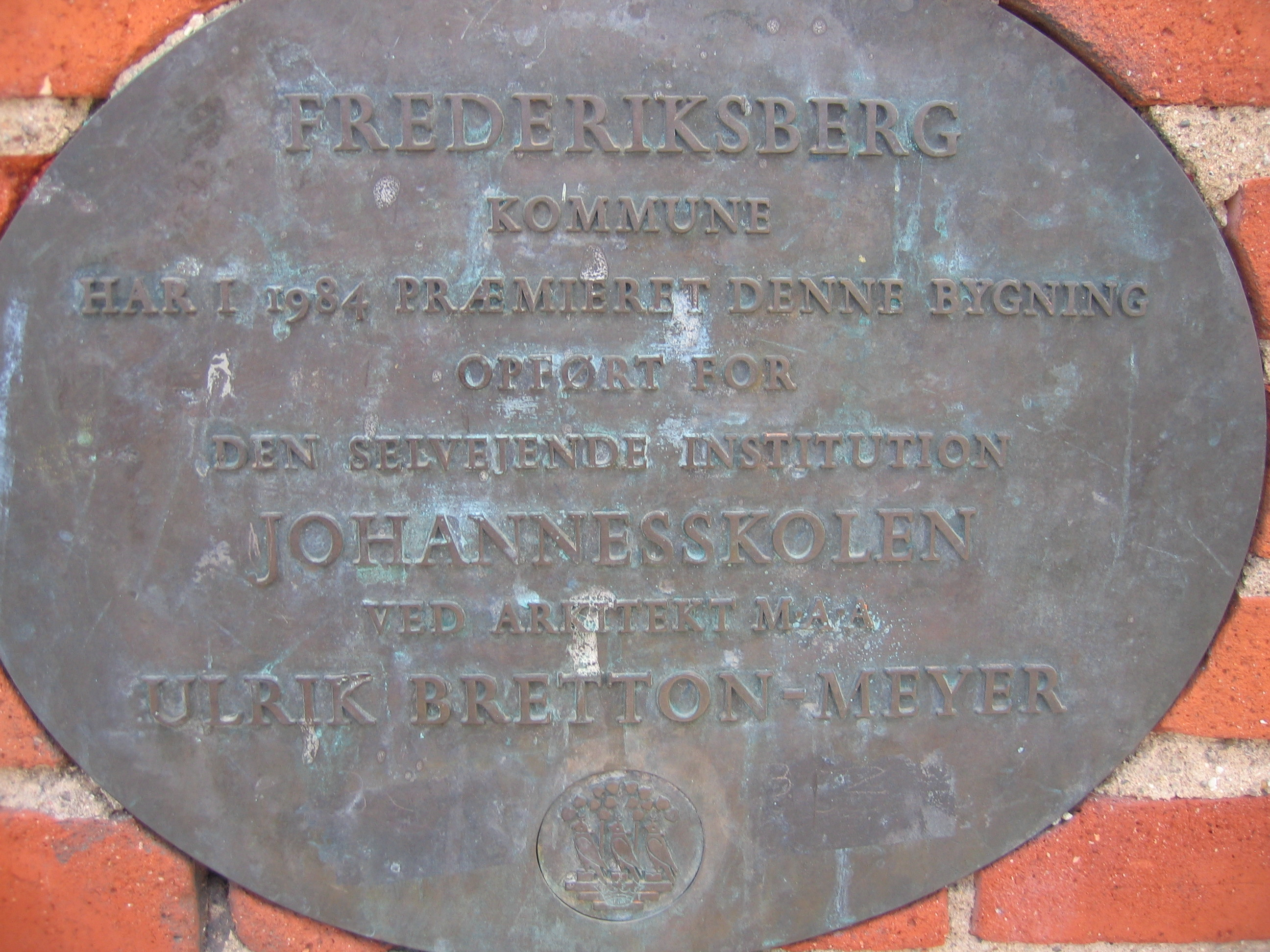 Johannesskolen